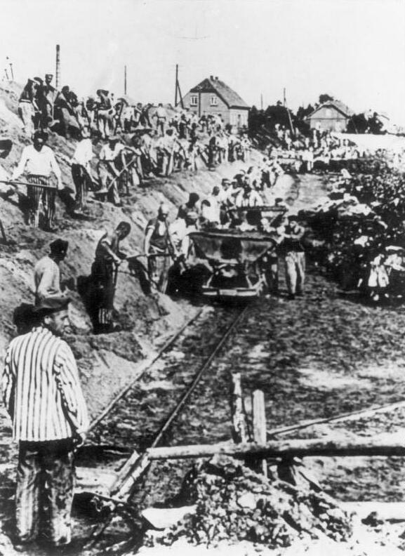 Zentralbild / IML KZ Sachsenhausen. - Die Häftlinge von Sachsenhausen wurden zu schwerer Arbeit im Klinker-Werk gezwungen, wo viele vor Erschöpfung zusammenbrachen und ermordet wurden.